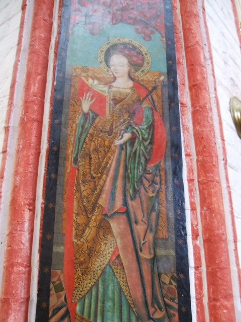 Hl. Apollonia, Stralsund, Nikolaikirche